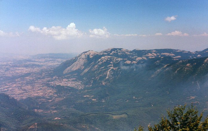 Sono interessato anche a foto dei paesi vicini, come Bagnoli Irpino. Qui ho rappresentato la cittadina irpina come appare dalla vetta del monte Celica. Da notare il monte Piscacco immediatamente dietro Bagnoli Irpino.